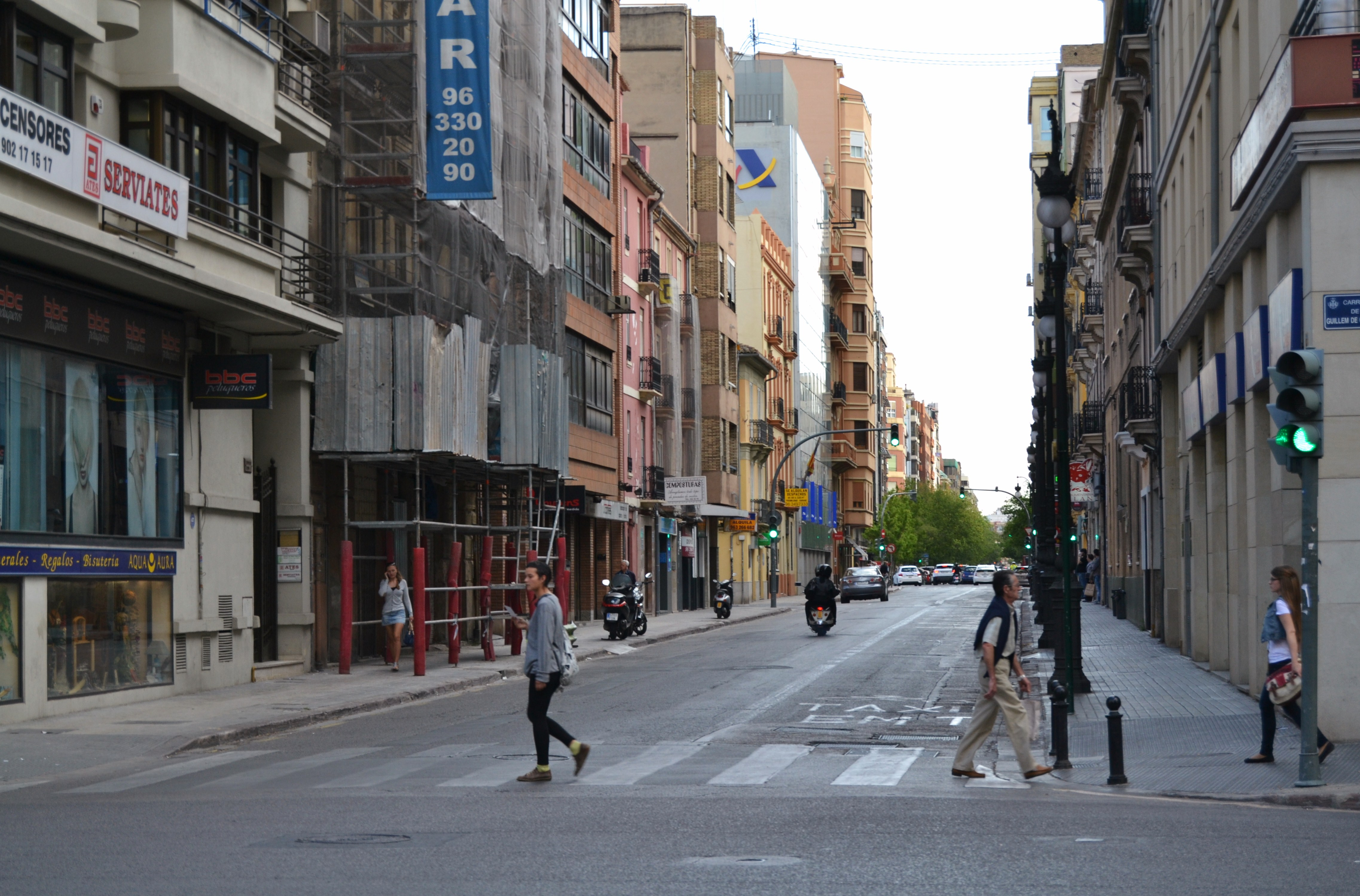 Inici del carrer de Jesús de València.